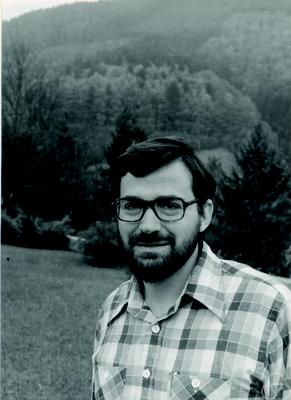 Foto di George Papanicolaou